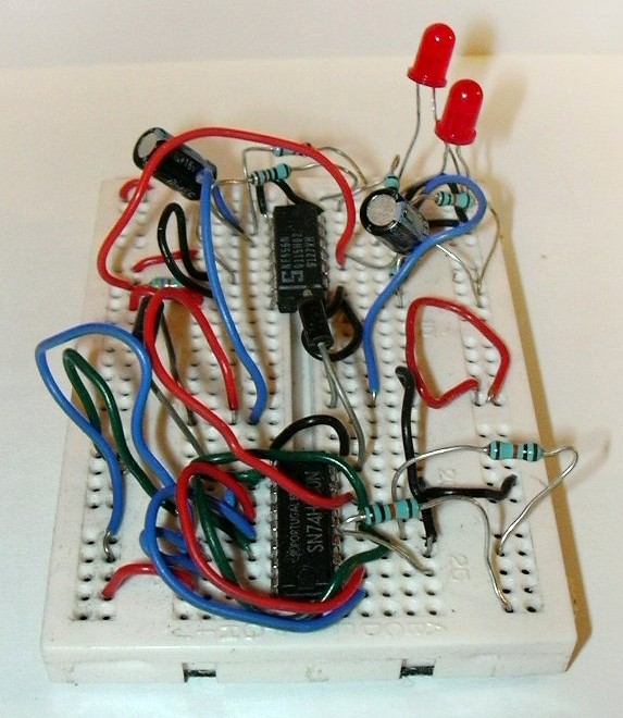 완전한 회로가 구성된 빵판